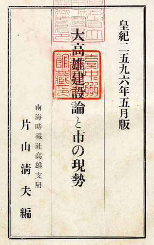 大高雄建設論と市の現勢 中文（台灣）: 大高雄建設論與市的現勢